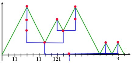 processus de contour et reconstruction de l'arbre associé